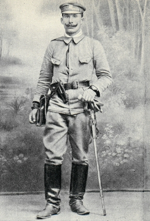 Mieczysław Norwid-Neugebauer, okres legionowy